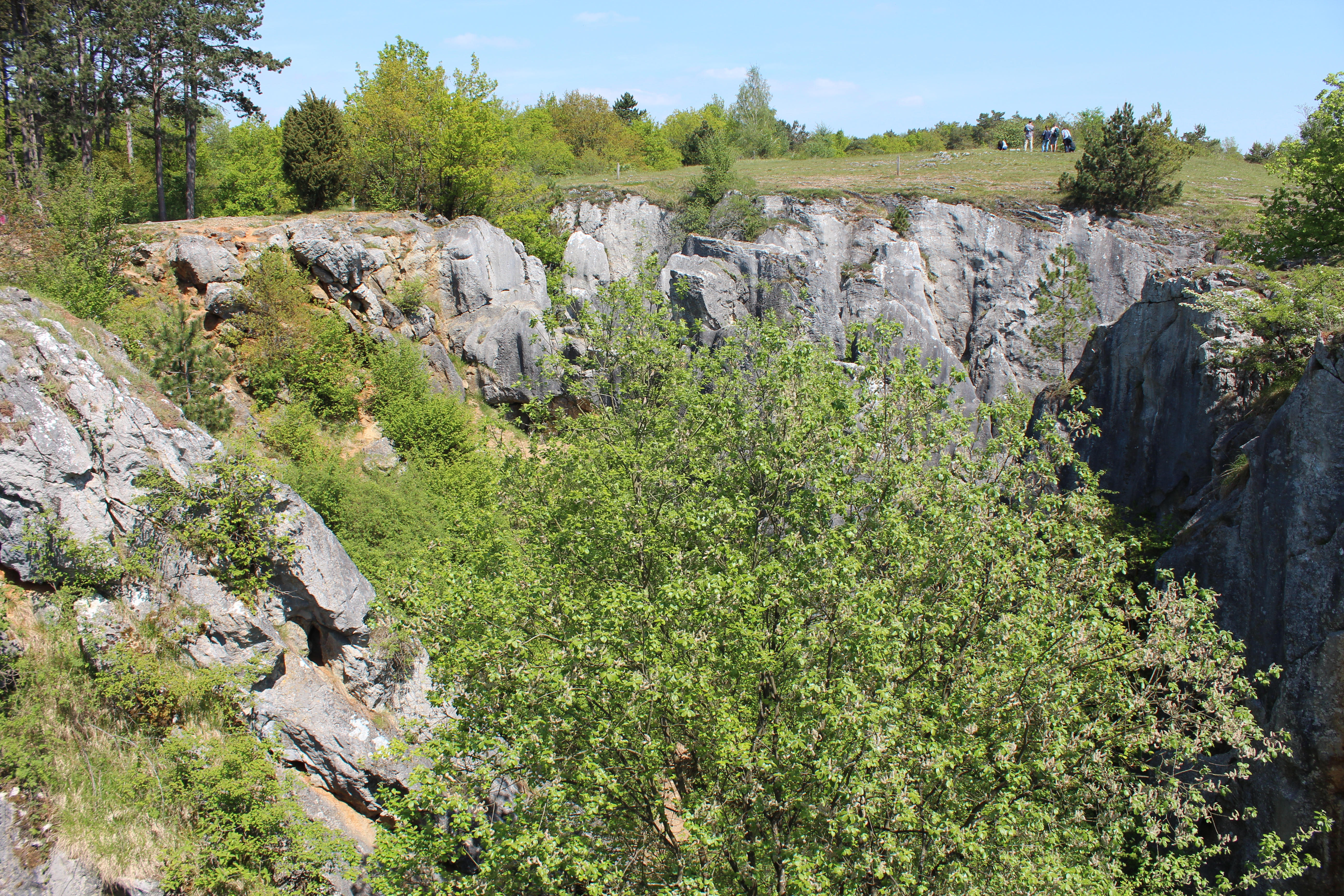 Door chemische verwering is een komvormige laagte ontstaan (doline). De grond is door verwering ingezakt. Het gesteente is door zuurhoudend regenwater deels opgelost en daardoor zwak geworden.